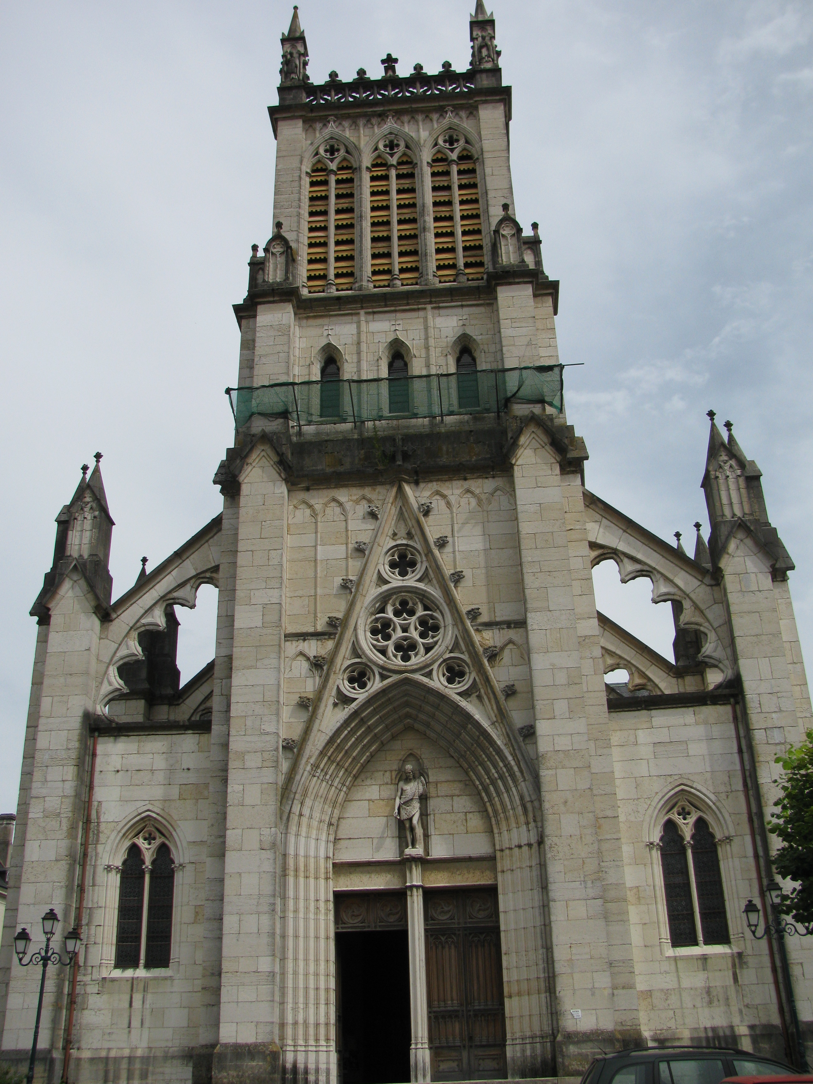 Cathédrale de Belley, France